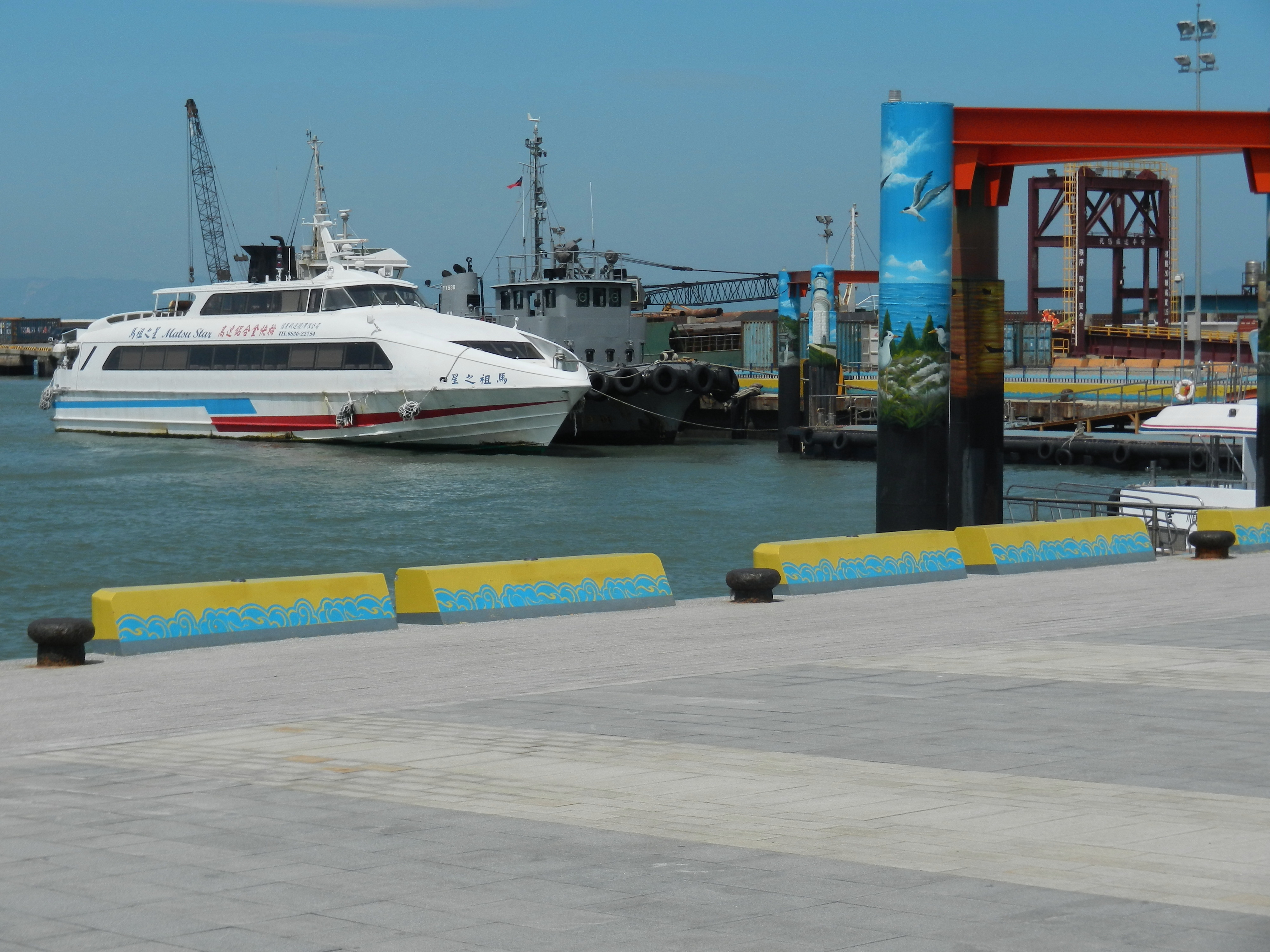 Fuao Harbour 福澳港